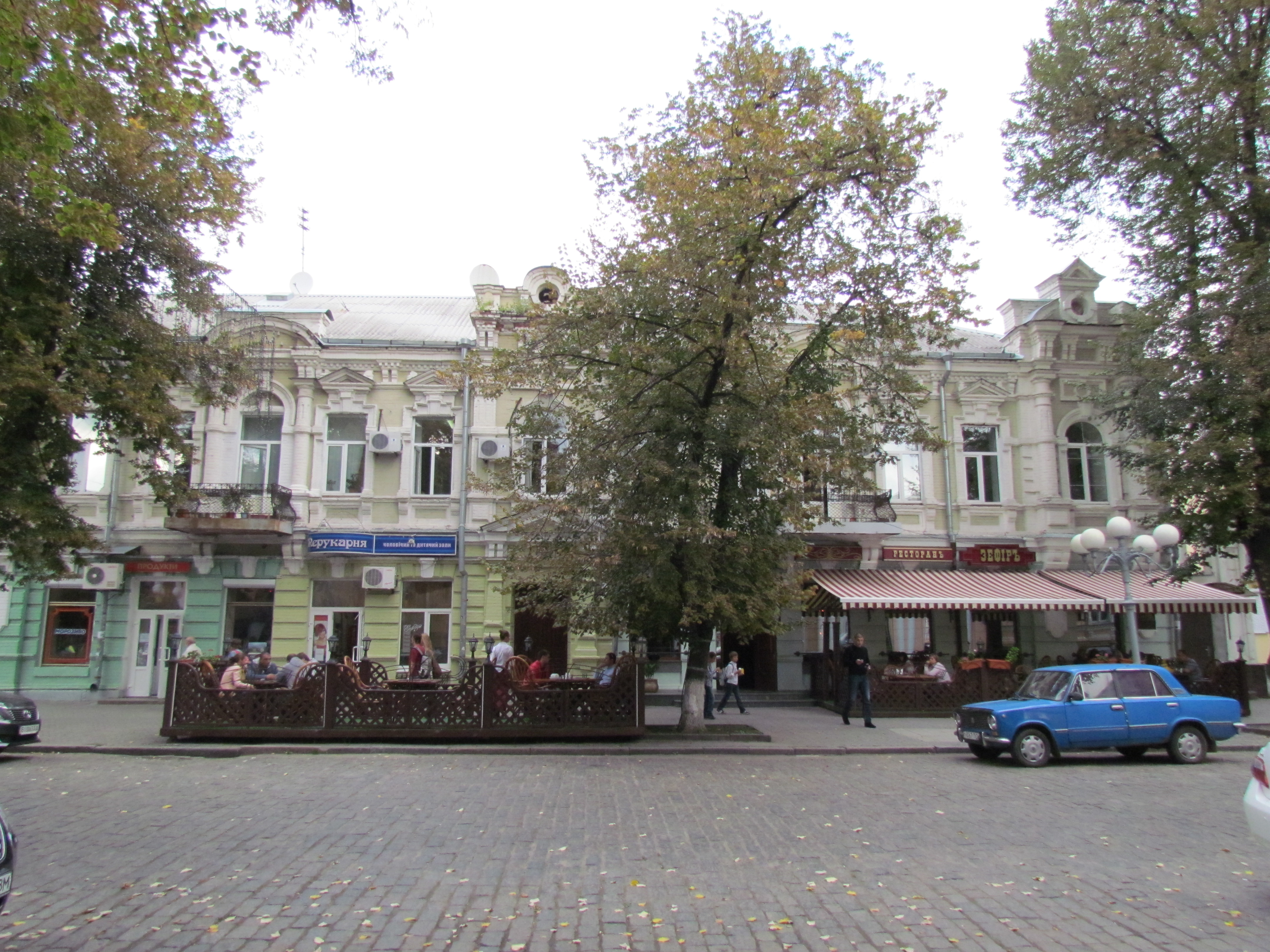 Акцизне відомство (Житловий будинок з магазином)